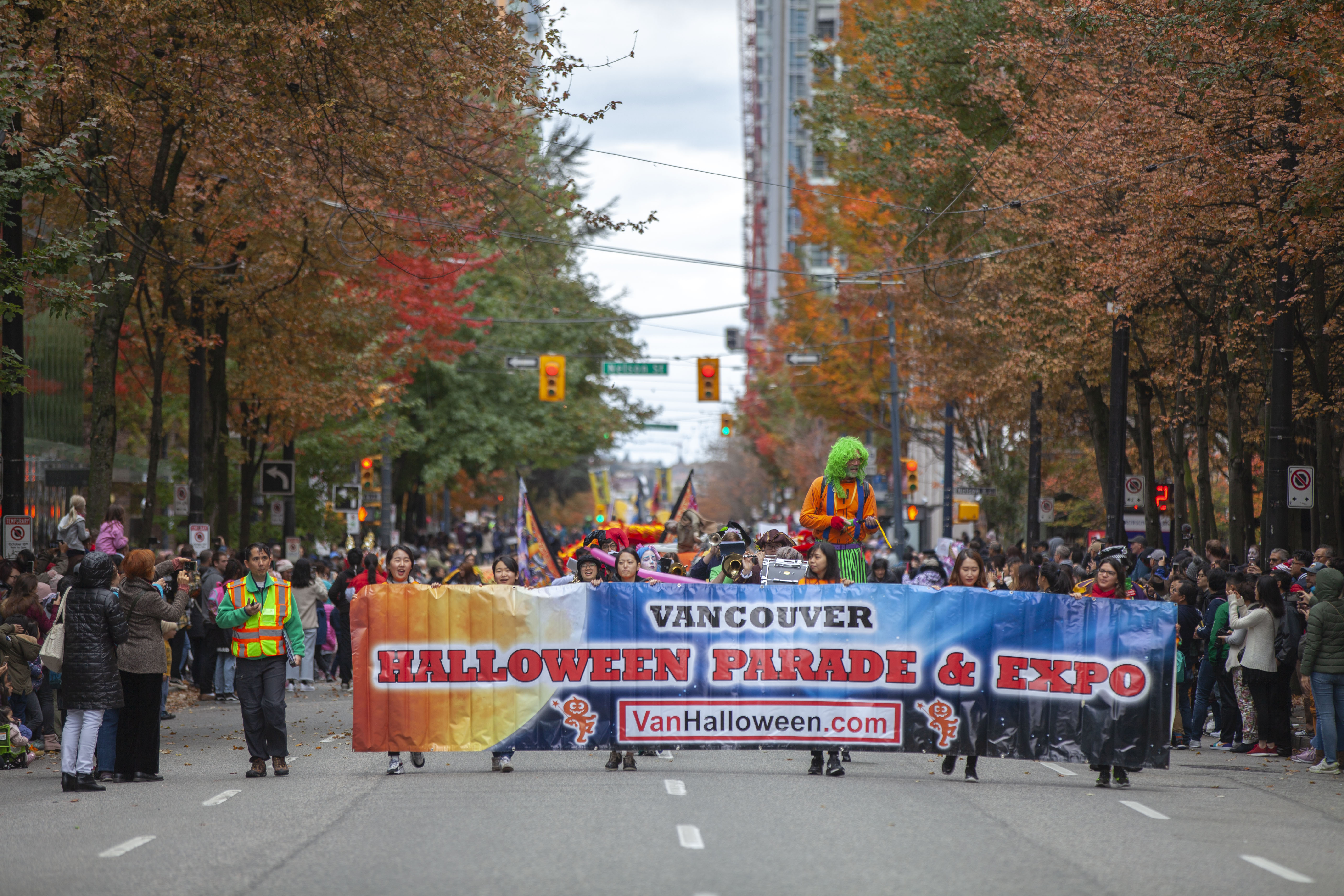 Halloween Parade 2019